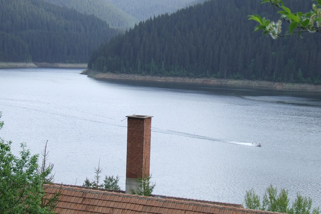 View from Fântânele Lake, Cluj County, Romania